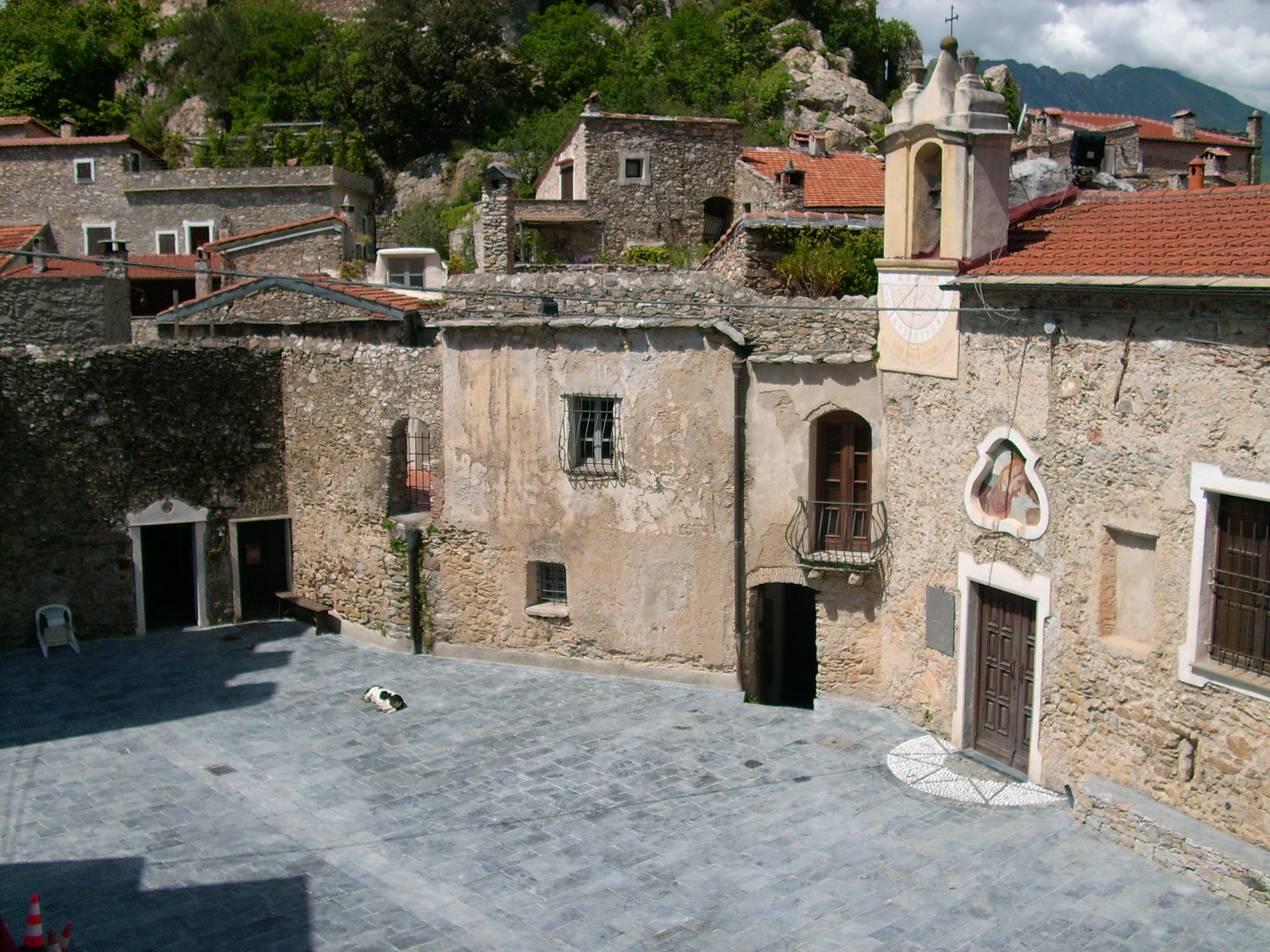 Castelvecchio di Rocca Barbena, Liguria, Italia